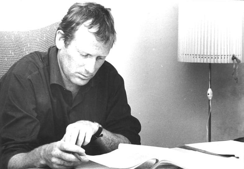 Zentralbild-Kutscher-24.3.71-we-Berlin: Wolfgang Kohlaase (geb. 13.3.1931), Schriftsteller und Filmdrehbuchautor. Er wurde mit dem Nationalpreis, mit der Artur-Becker-Medaille und mit der Erich-Weinart-Medaille ausgezeichnet. Mitglied der SED ist er seit 1956.